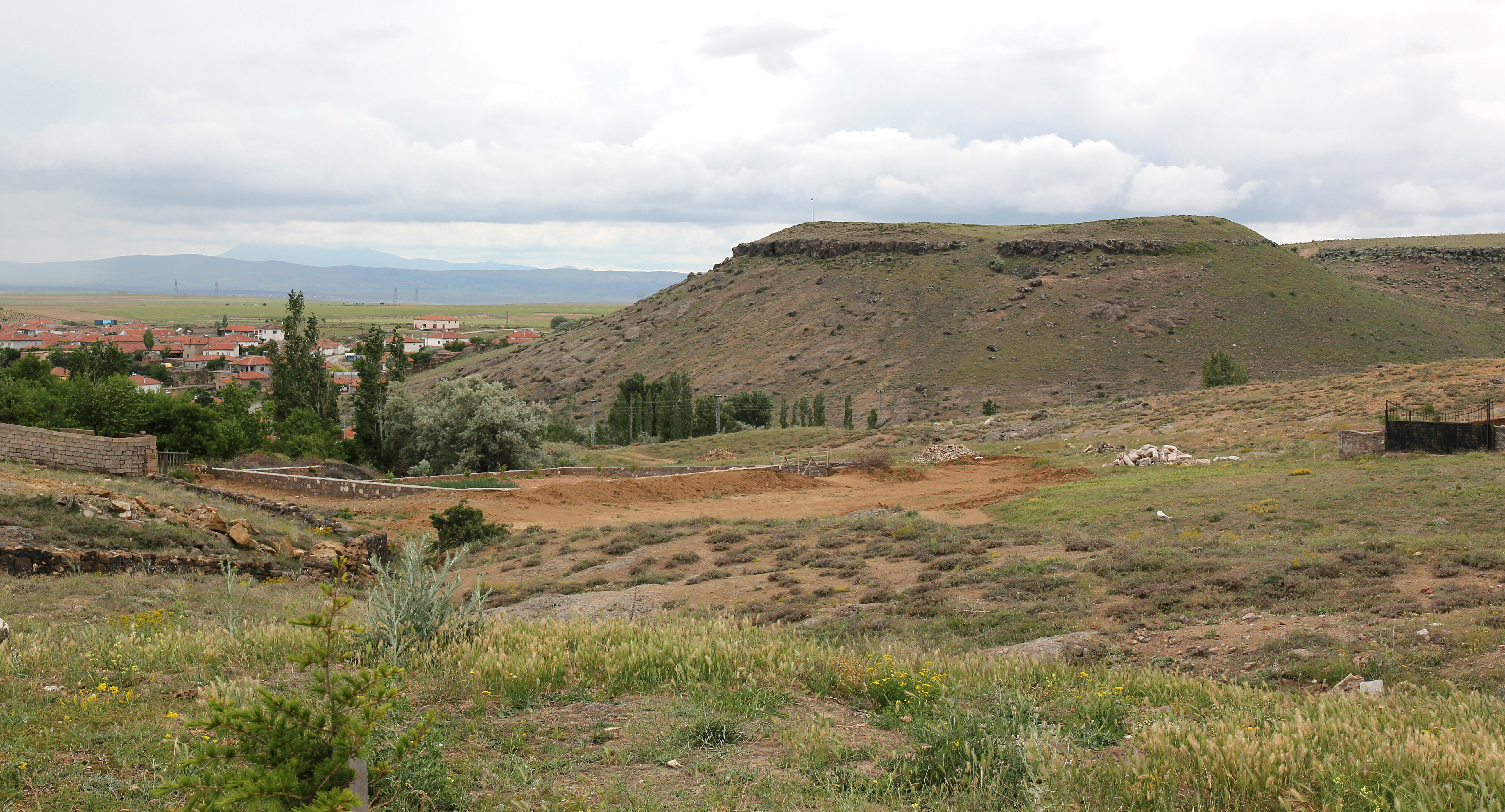 späthethitische Felsinschrift von Karaburna (Karaburun) nahe Hacıbektaş, Zentraltürkei, Tafelberg von Nordosten